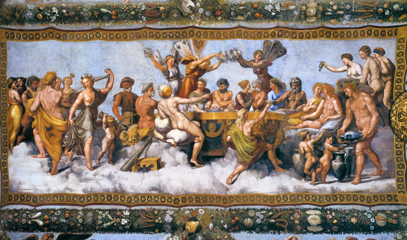 Гермес, вводящий Психею на Олимп Лоджия Психеи, Вилла Фарнезина, Рим